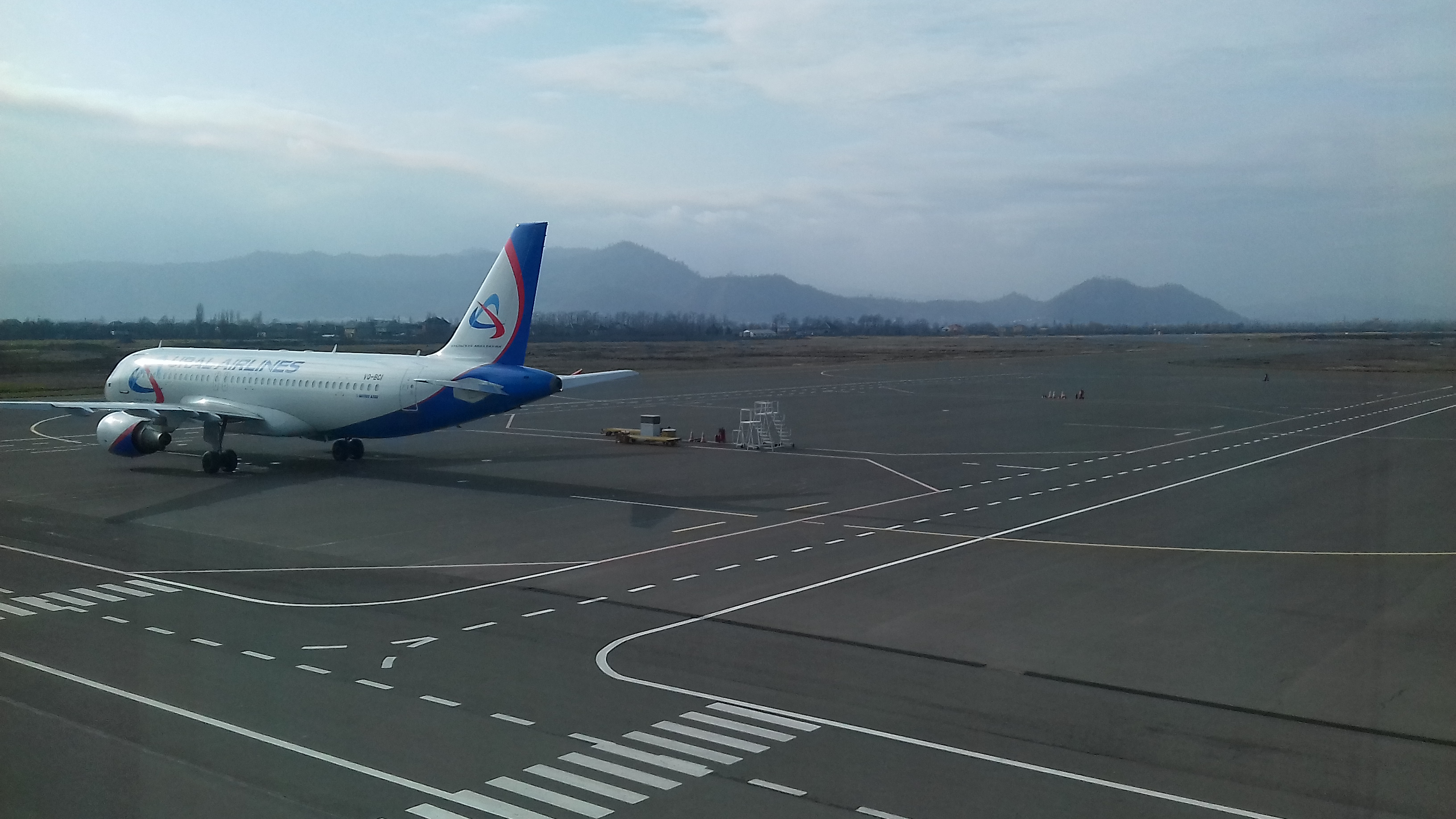 Ural Airlines'a məxsus təyyarə Lənkəran Beynəlxalq Hava Limanında